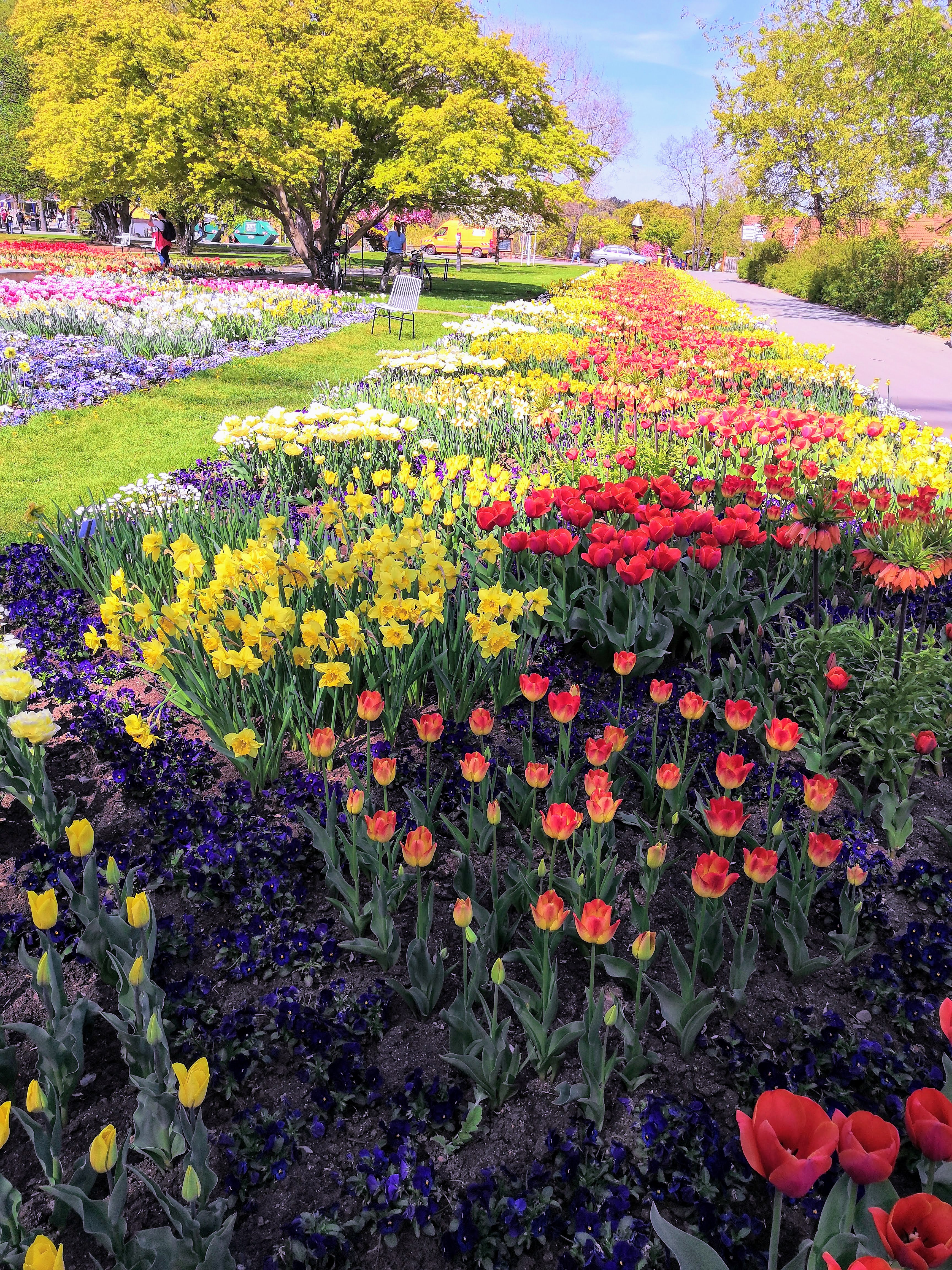 egarpark Zentrales Blumenbeet im April 2019